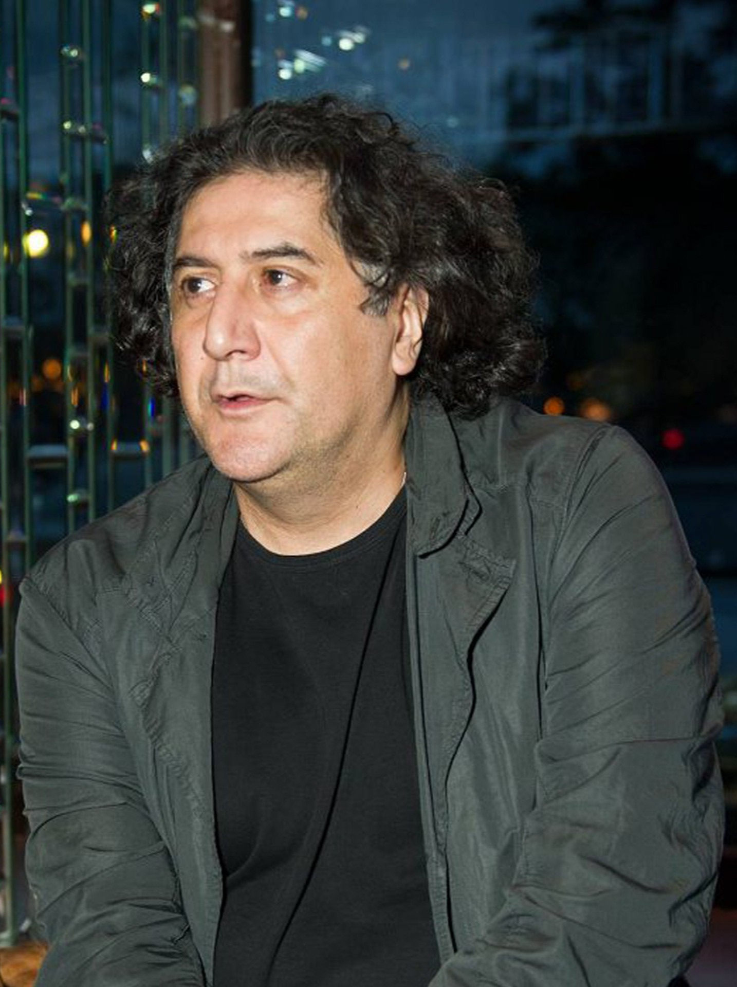 Тоҷикӣ: Бахтиёр Худойназаров